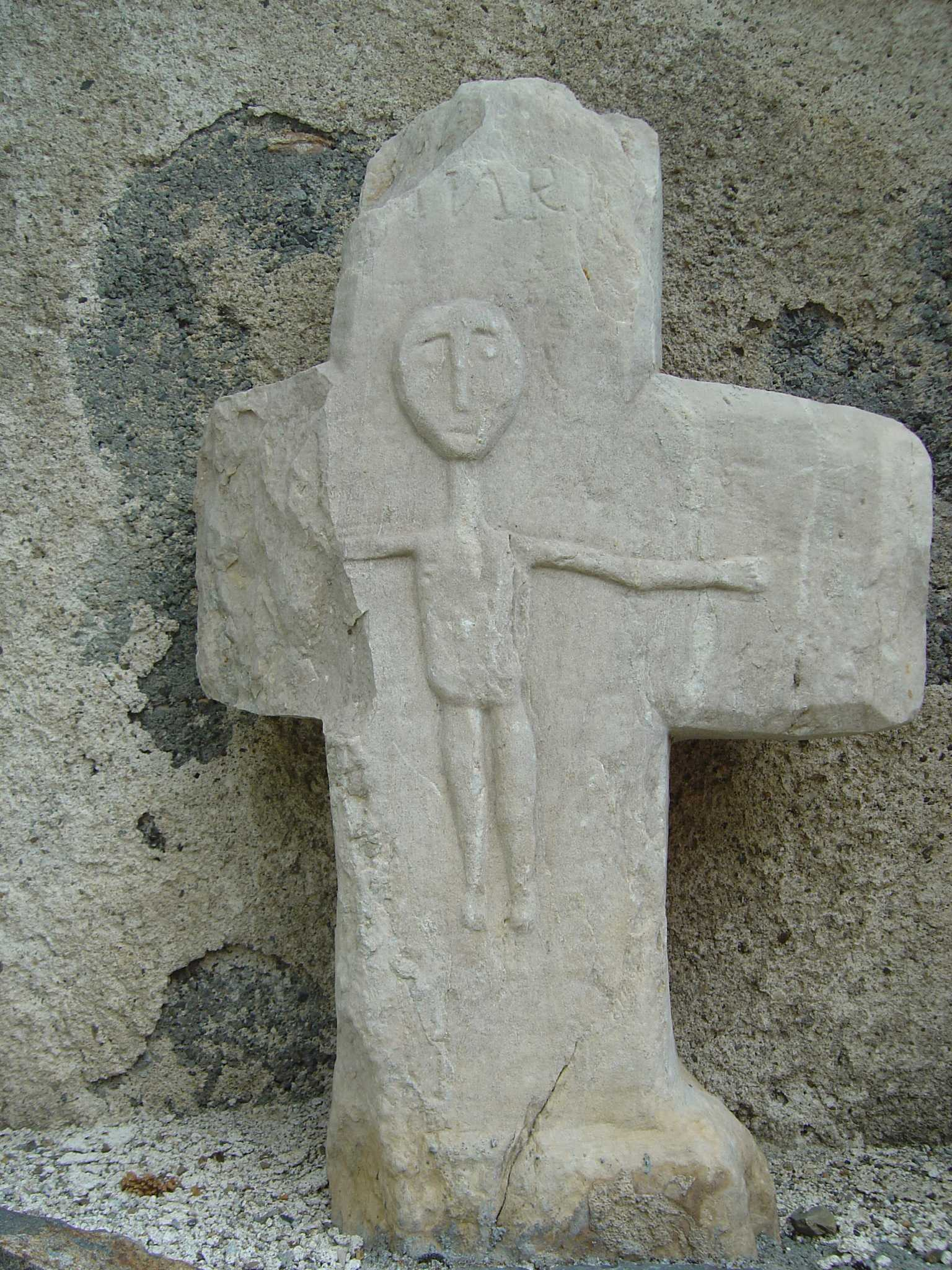 Statue dans le cimetière de Gouaux (Hautes-Pyrénées, vallée d'Aure)